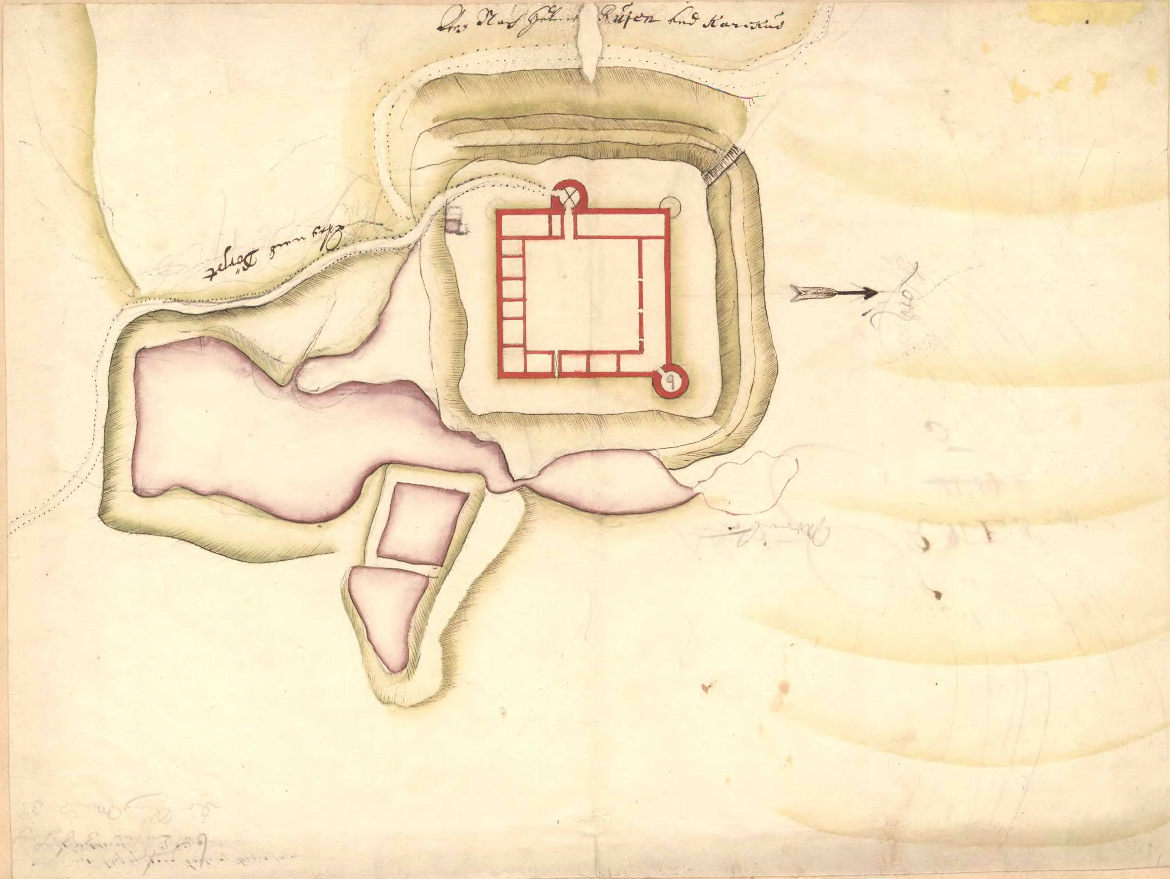 Härgmäe linnus XVII sajandil. Skeem Rootsi Sõjaarhiivist.